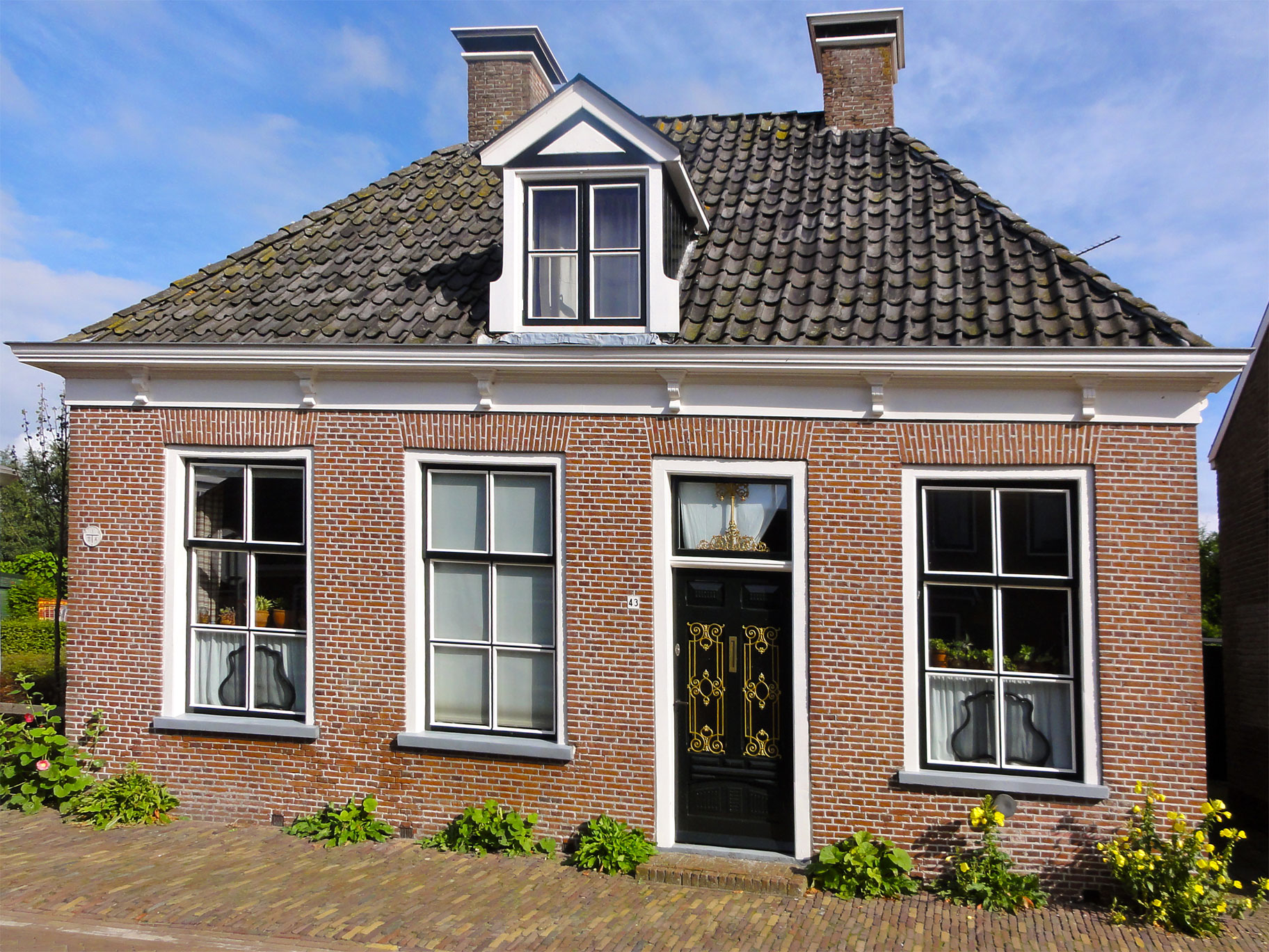 Elte Martens Beimastrjitte 43 Eastermar